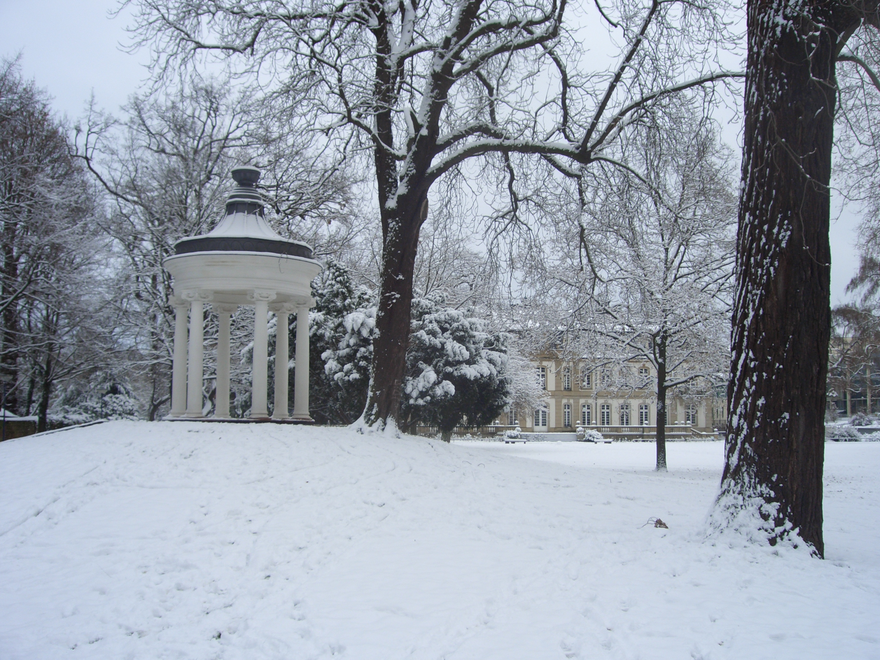 Büsing-Park in Offenbach